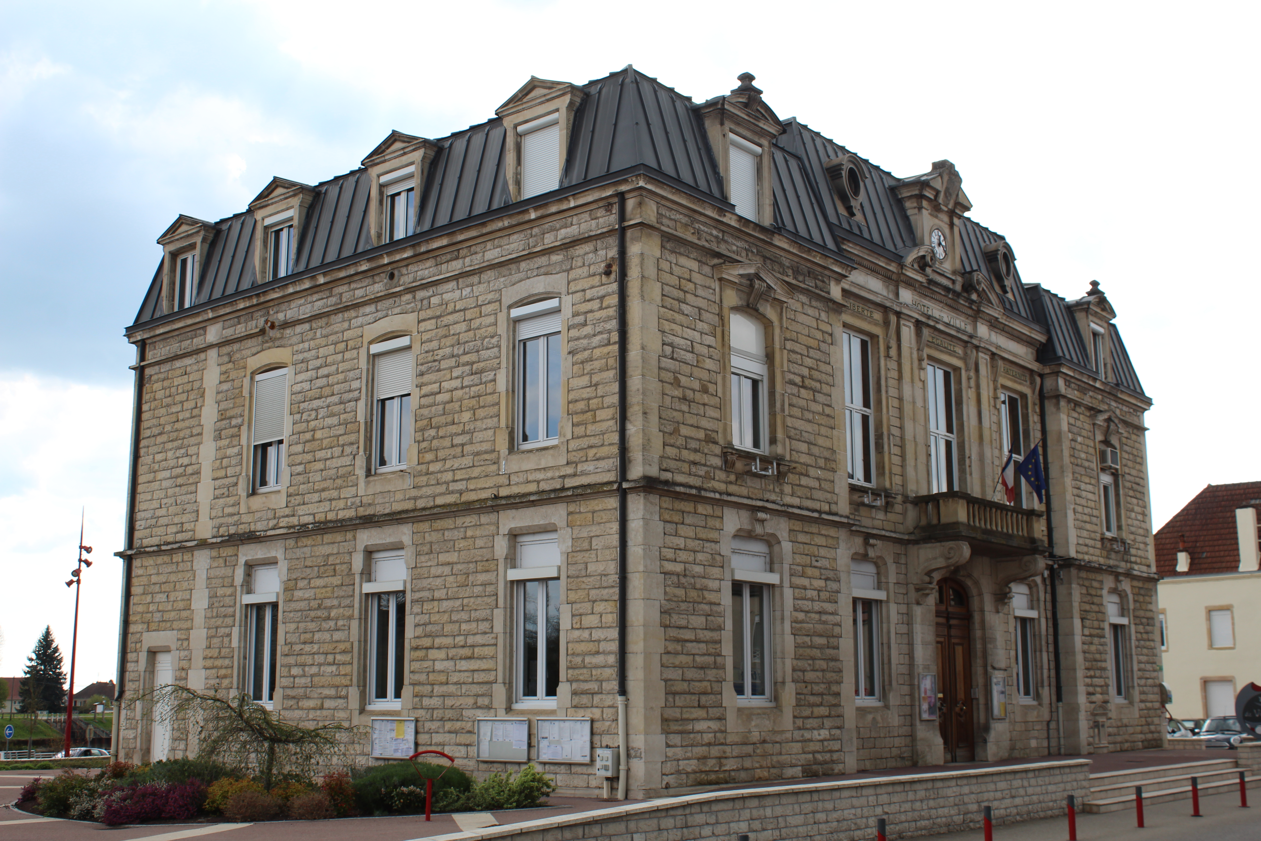 Hôtel de ville de Gueugnon.